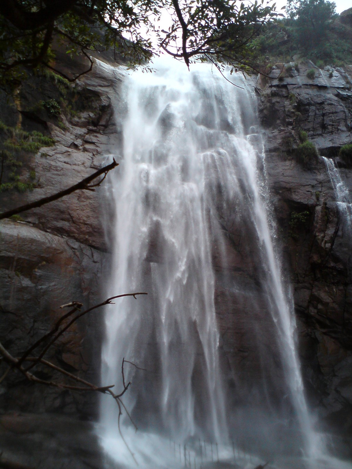 Amazing View Of Agaya Gangai In Kolli Hills